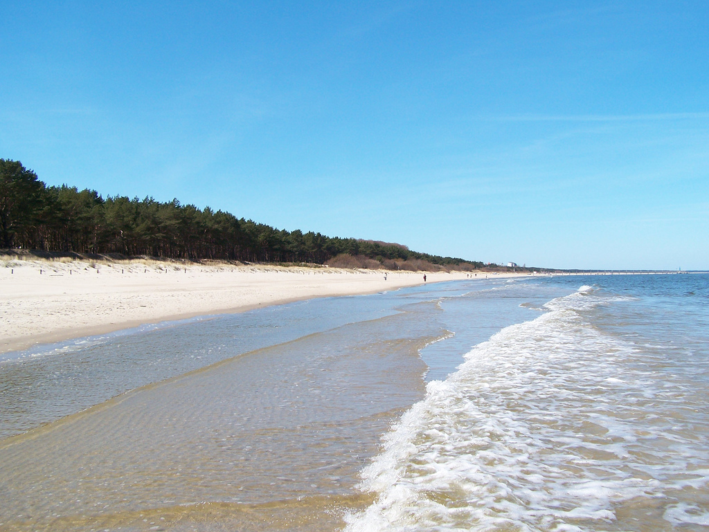 Usedom (polnisch Uznam, wendisch Uznj�m/Uznjom) ist eine Insel in der Ostsee vor dem Stettiner Haff, welche zum größeren Teil zum deutschen Land Mecklenburg-Vorpommern geh�rt. Der östliche Teil der Insel ist polnisches Staatsgebiet. Weiter östlich schließen sich die Insel Wollin und Kaseburg an. Quelle